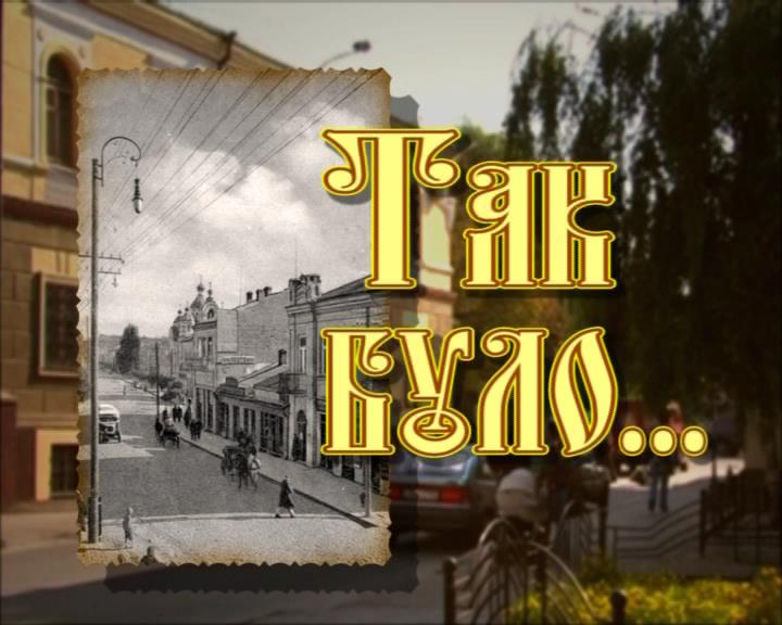 Логотип телепрограми